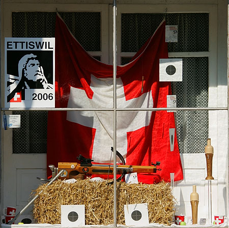 Eidg. Armbrustschiessen 2006 in Ettiswil